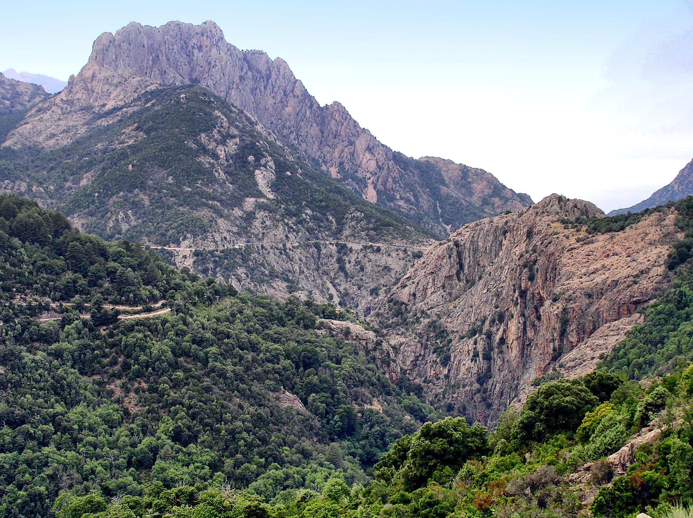 Évisa, Ouest Corse - Vue depuis la D84 (Évisa) sur les Gorges de Spelunca par lesquelles transite le ruisseau de Tavulella (ou rivière de Porto). A l'arrière-plan, Capu a u Monte (1108 m).